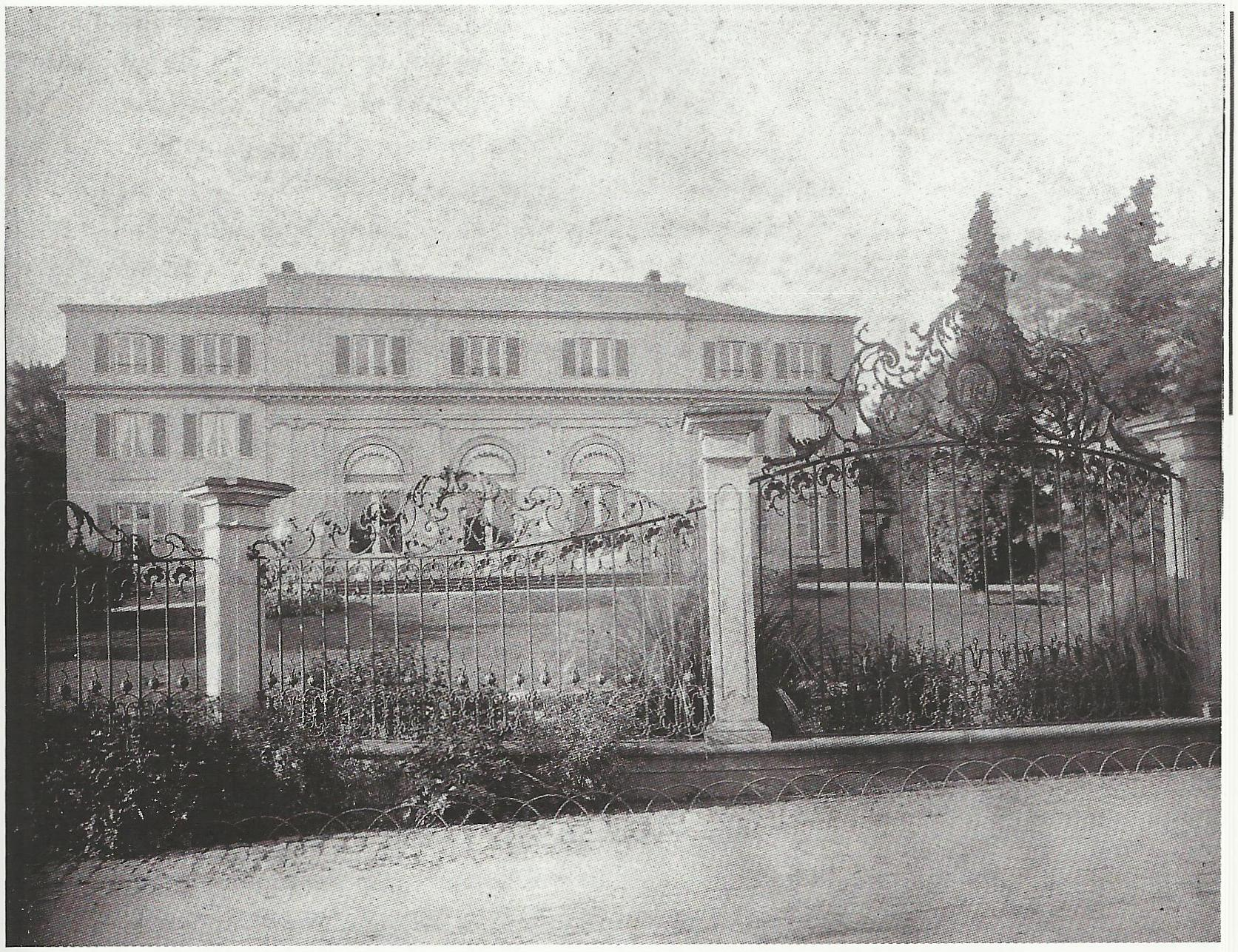 Redoute, Bad Godesberg: Außenansicht